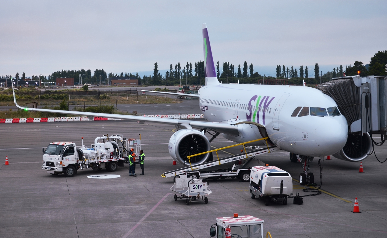 Avión Airbus A320neo de SKY Airline en Concepción Carriel Sur, el 10 de Diciembre de 2019.